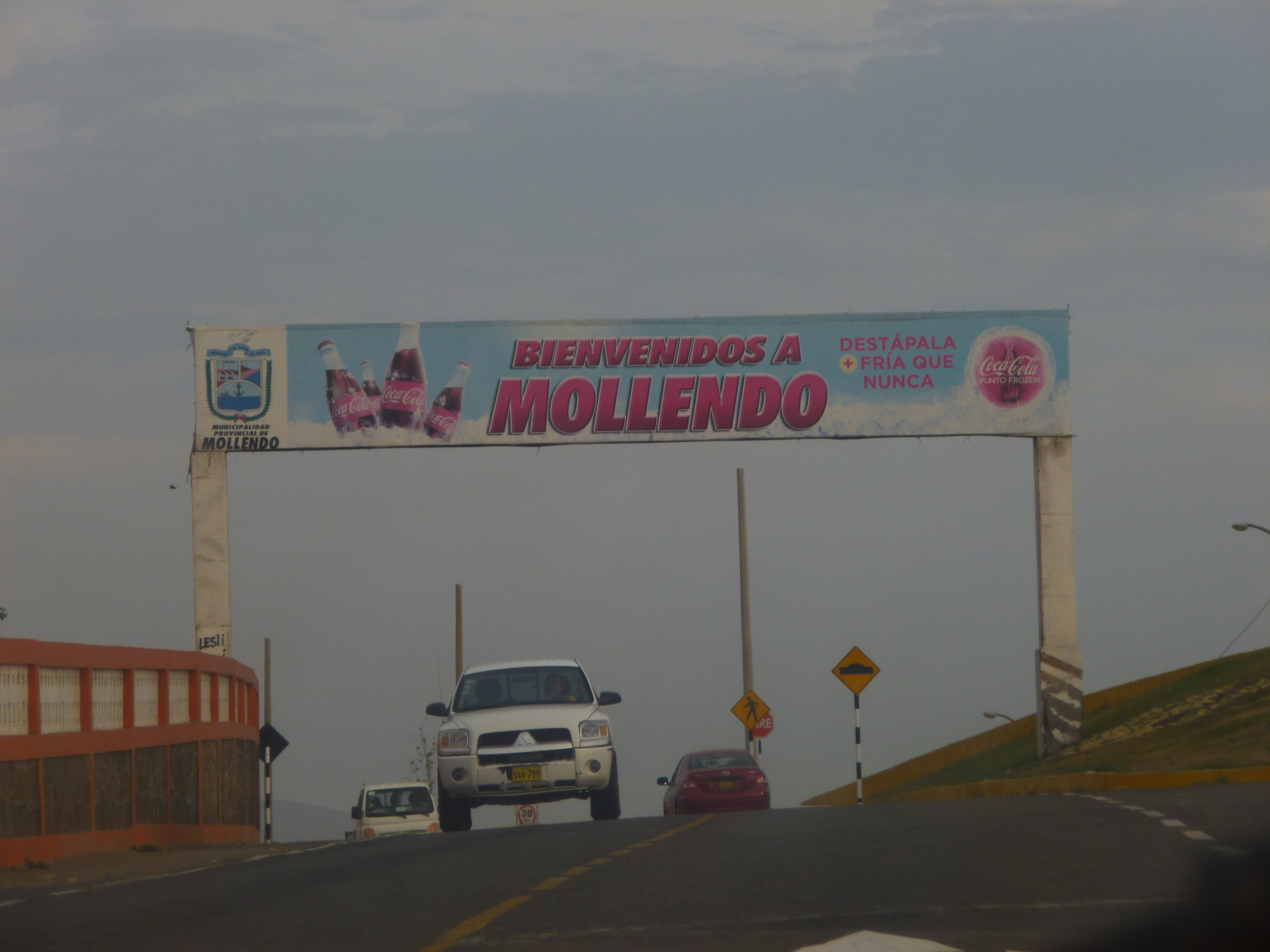 Cartel que da la Bienvenida a la ciudad de Mollendo.